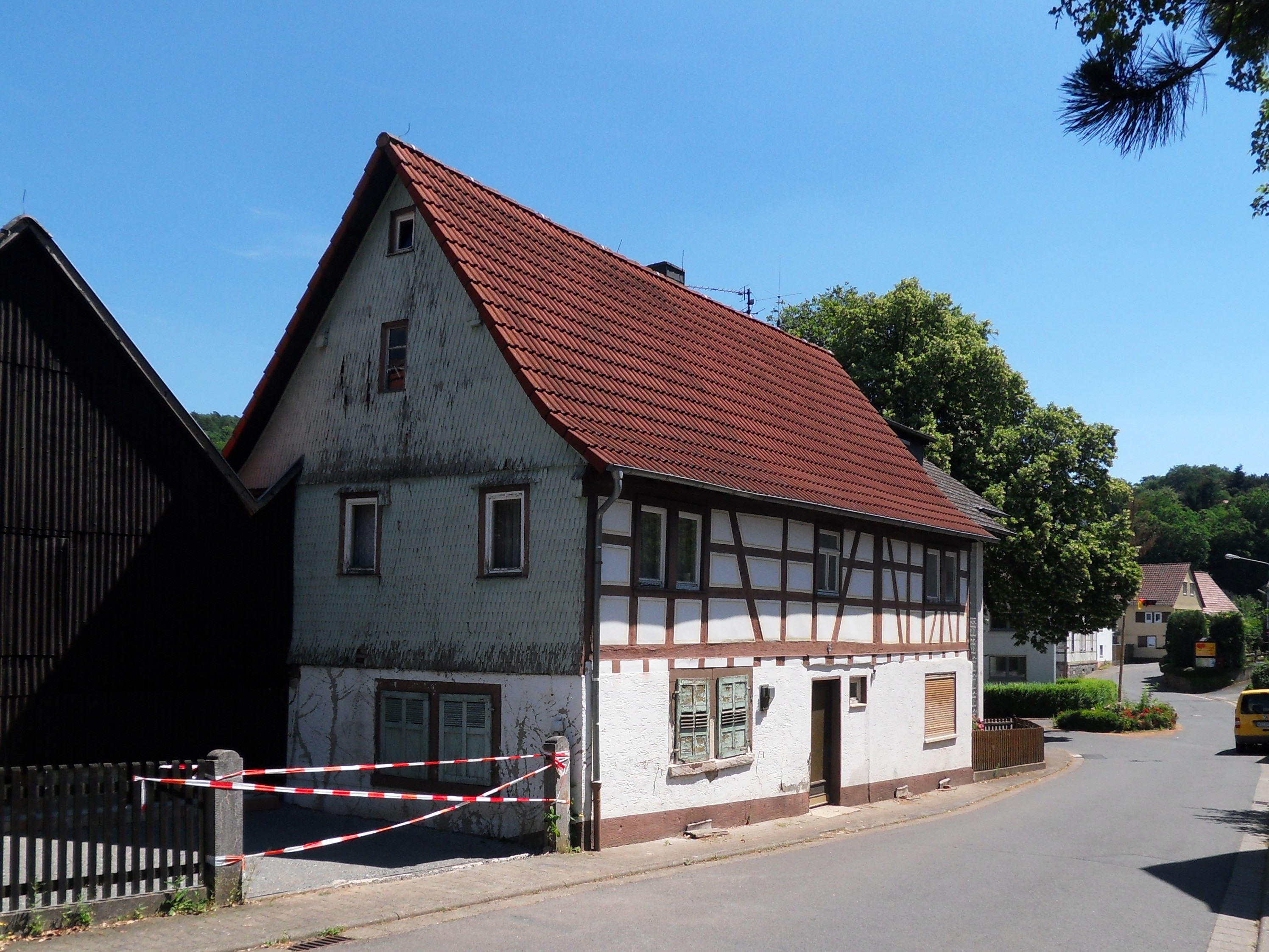 Zweigeschossiges denkmalgeschütztes Fachwerkwohnhaus des späten 18. Jahrhunderts in der Lindenstraße 3 in Affhöllerbach mit Scheuer von 1816